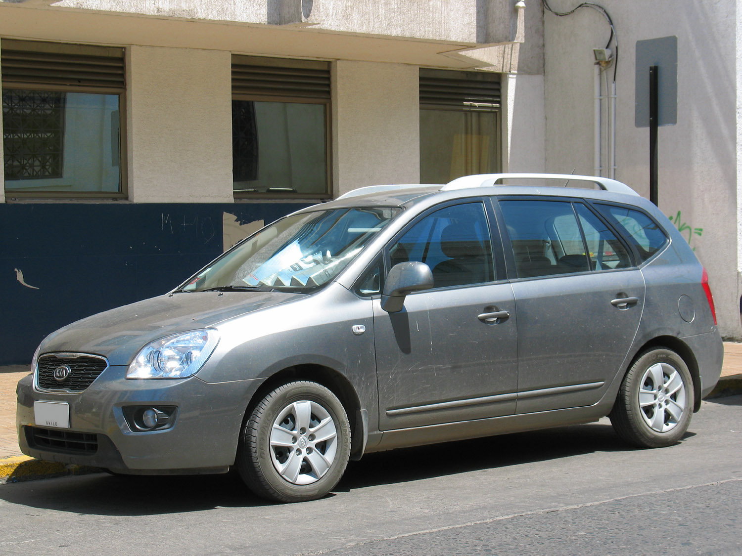 carens 2012